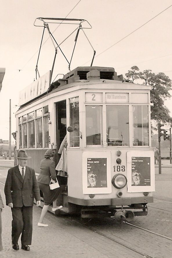 MVV-Vorkriegswagen 183